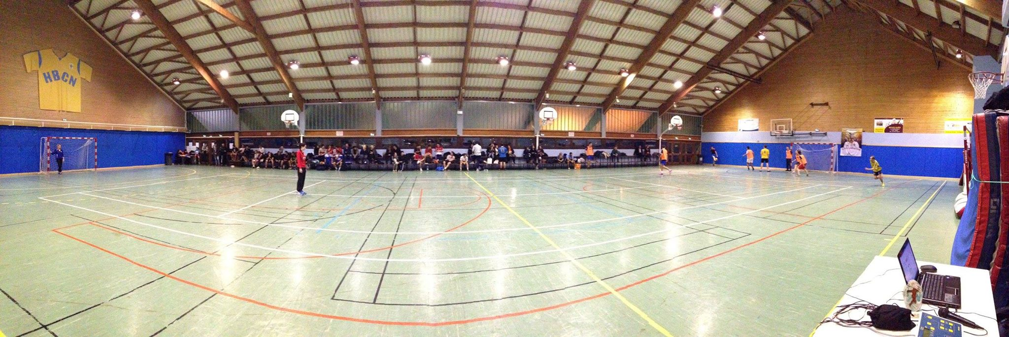 L'intérieur du gymnase de Noidans-lès-Vesoul